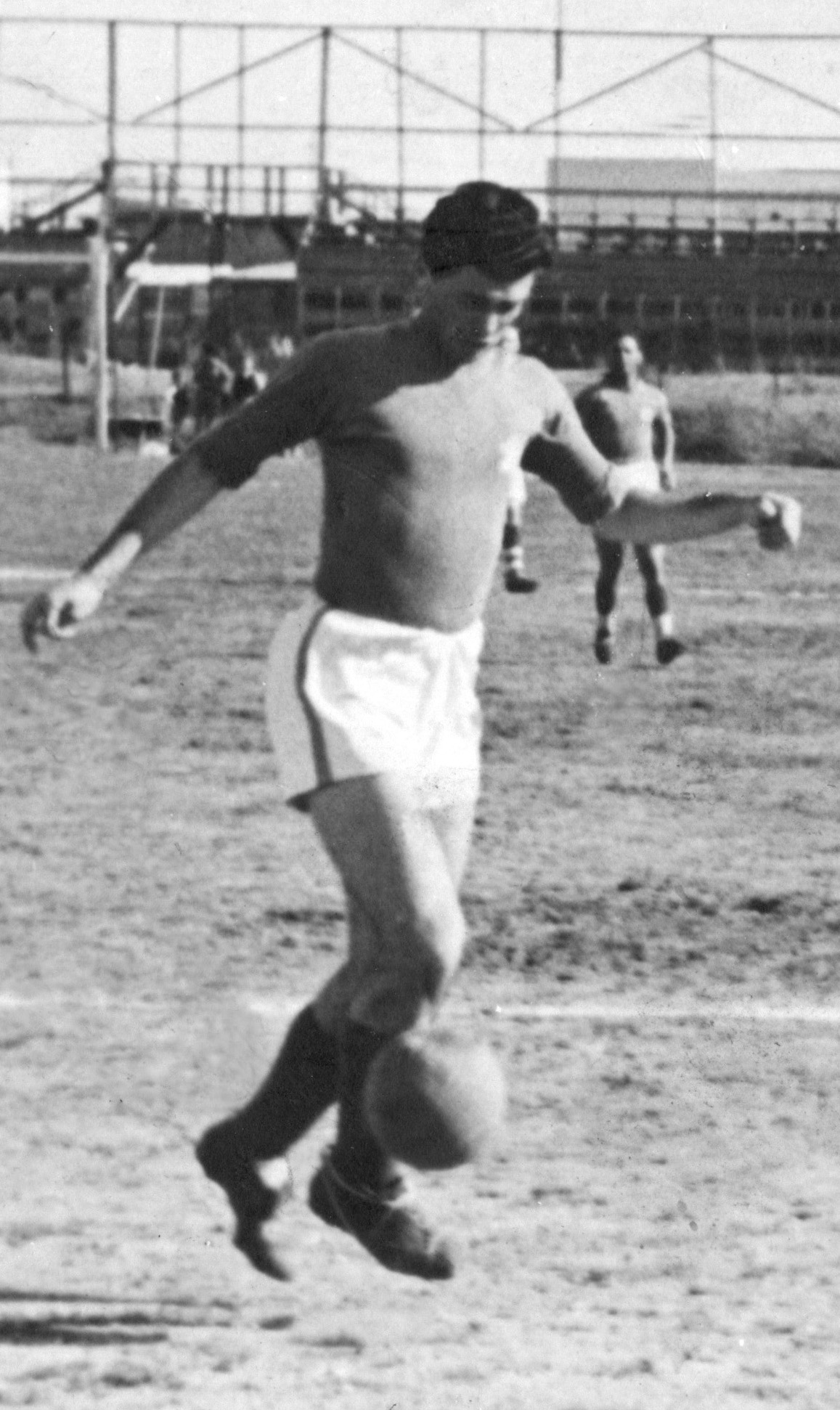 בתמונה מופיע שמואל מילה גינזבורג במגרש המכביה בתל אביב